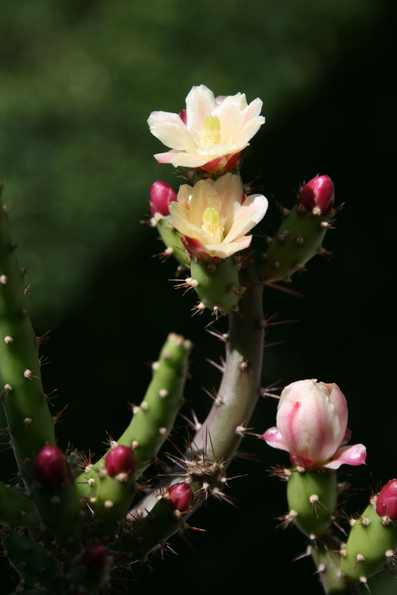 Opuntia salmiana (Opuntioideae; Cactaceae; Planta) kaktusz virágzó hajtása